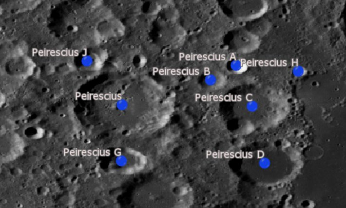 Cráter lunar Peirescius. Cráteres satélite. (Imagen LRO)